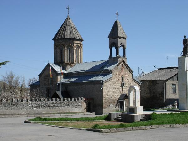 Армянская Церковь Сурб Аствацацин (Цхинвал)